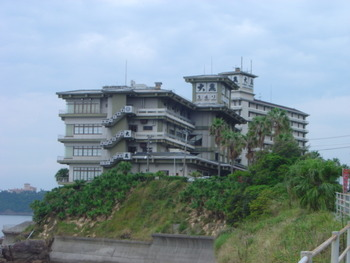 10号線から見る志布志大黒